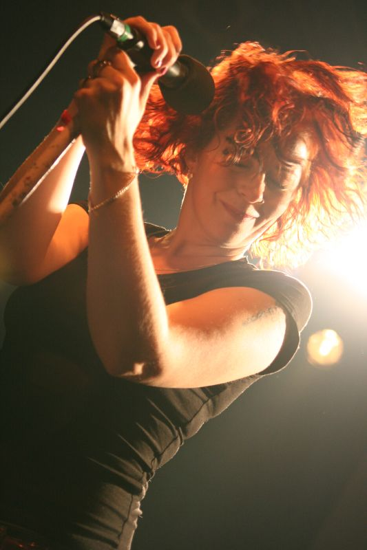 Singer Anneke van Giersbergen of The Gathering